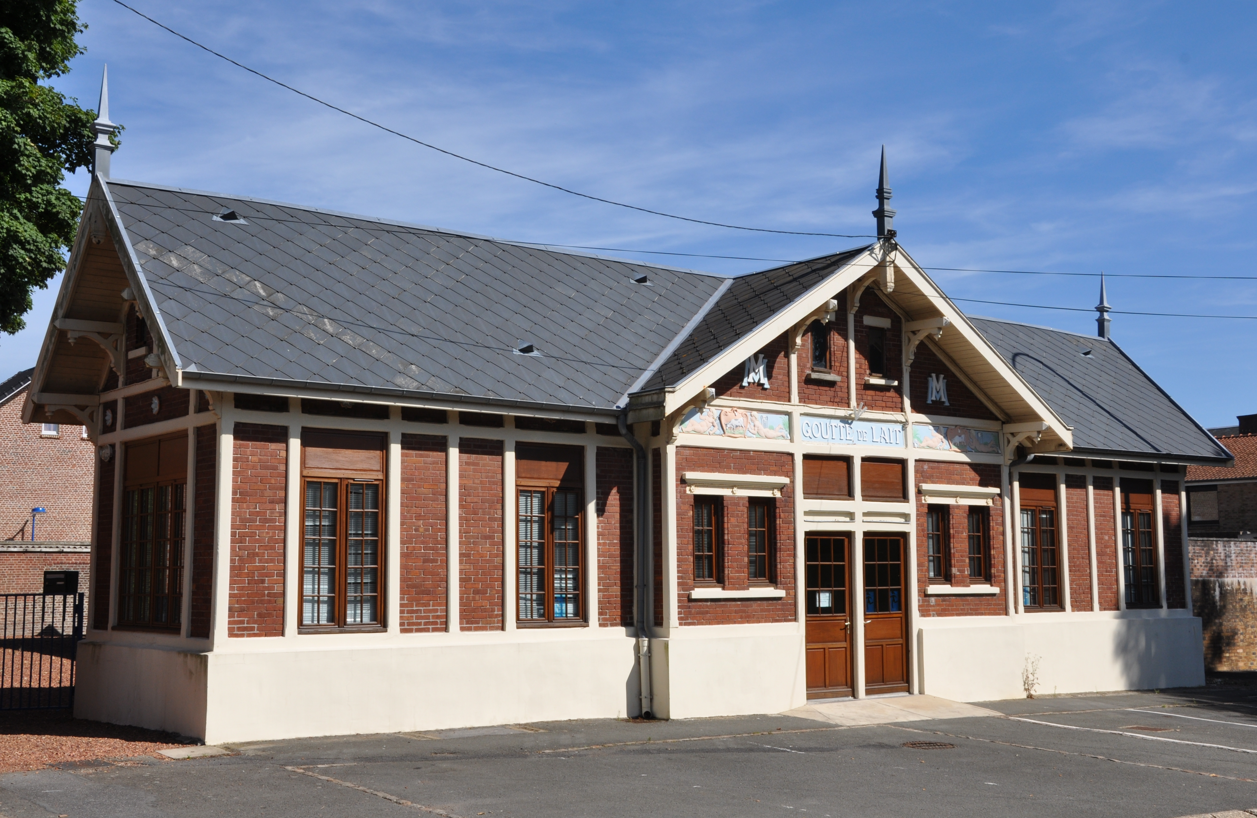 Goutte de lait de la Compagnie des mines de Marles, Auchel, Pas-de-Calais, Nord-Pas-de-Calais, France. .